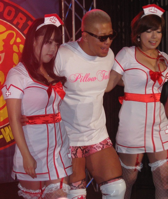 2013年6月22日 大阪大会 DOMINION6.22